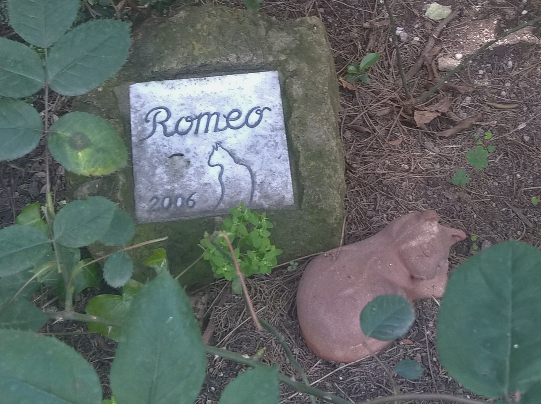 Pietra della tomba del gatto Romeo, all'interno del cimitero Acattolico si Roma.